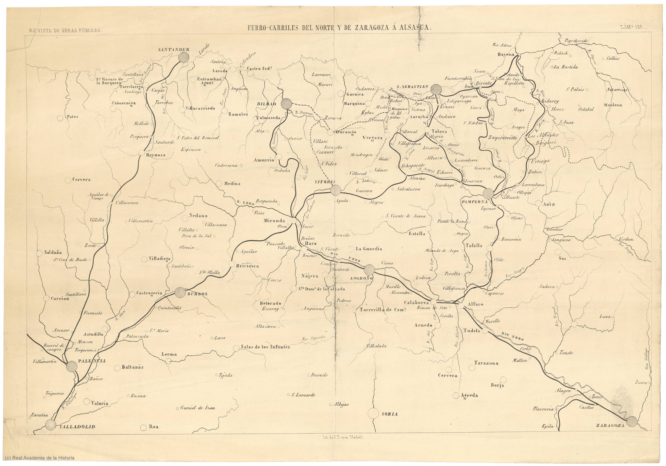 Este mapa se publicó en: Monterde, Agustín. Ferrocarriles del norte: De Zaragoza a Alsasua. Revista de Obras Públicas, 9, tomo I (2): 21-25 1861.